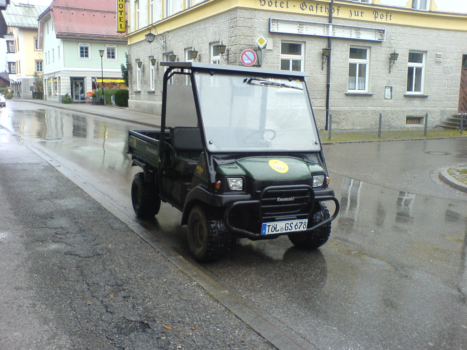 Kawasaki MULE™ 3010 Diesel